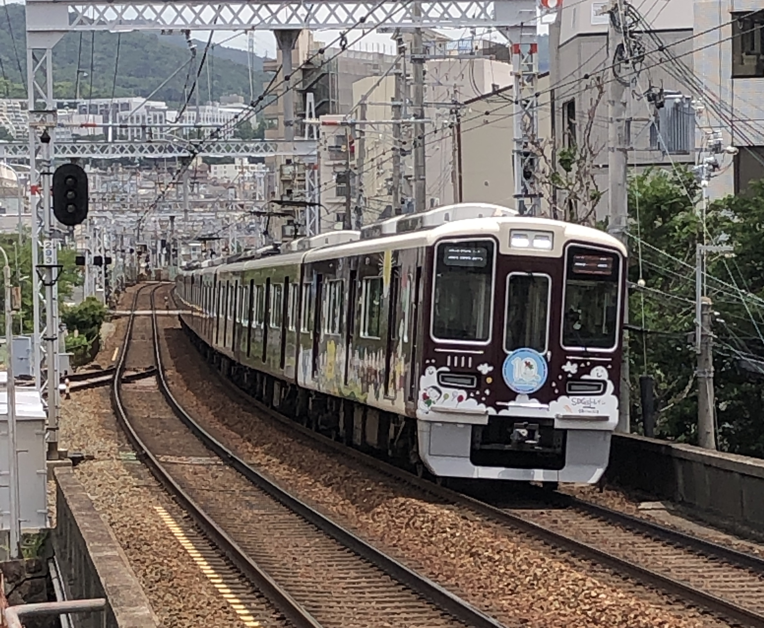 2019年5月27日よりラッピングされた阪急1000系1011F「SDGs 未来のゆめ・まち号」 2019年5月29日 王子公園駅にて撮影